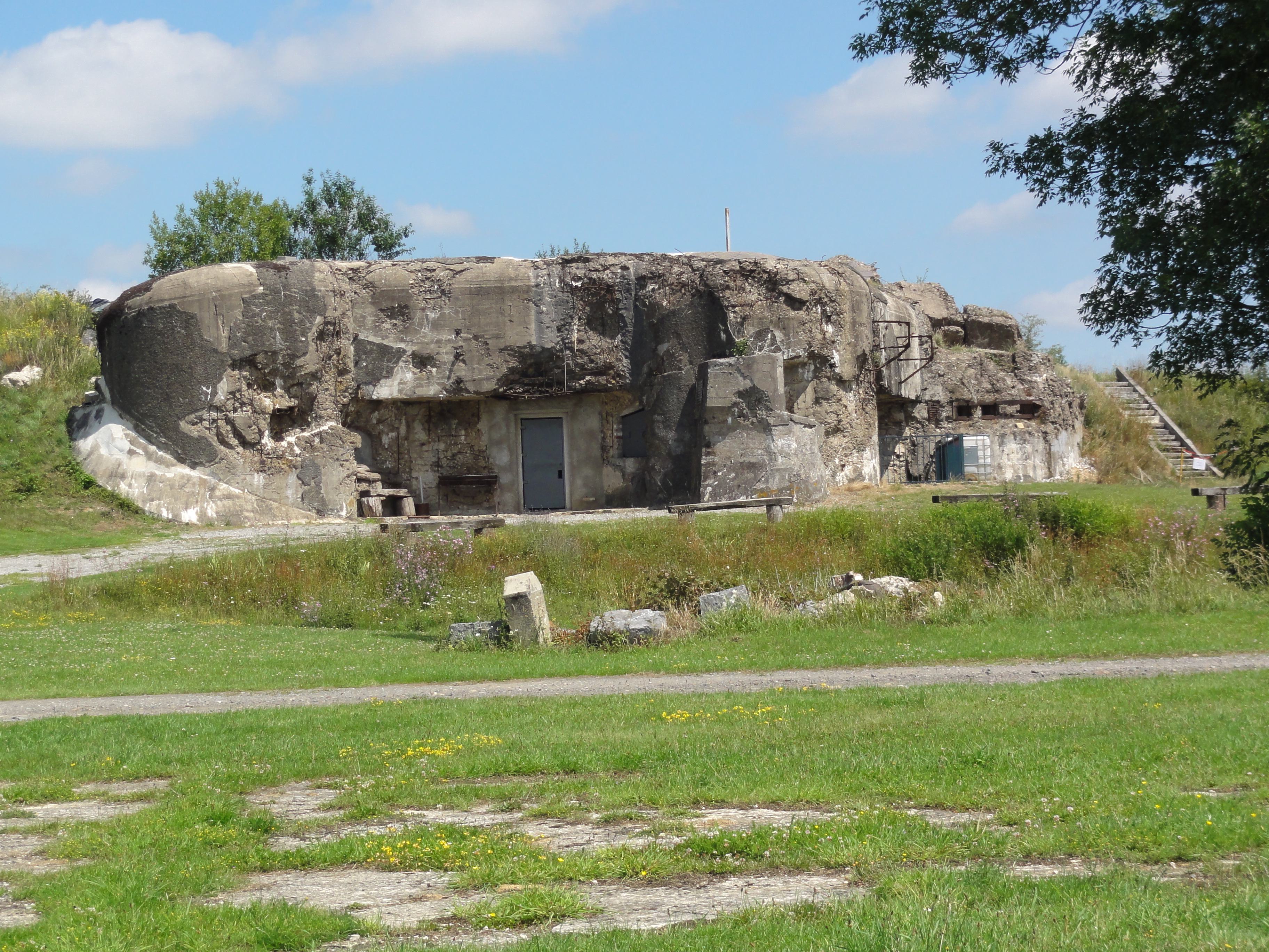 Vieux-Reng (Nord, Fr) fort de la Salmagne